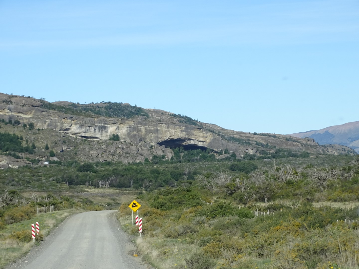 Cuevas del Milodon